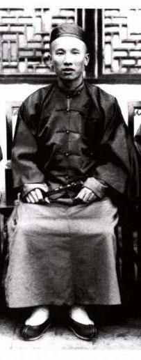 中文（台灣）: 光緒癸卯科進士李坤施汝欽袁嘉穀中式合影